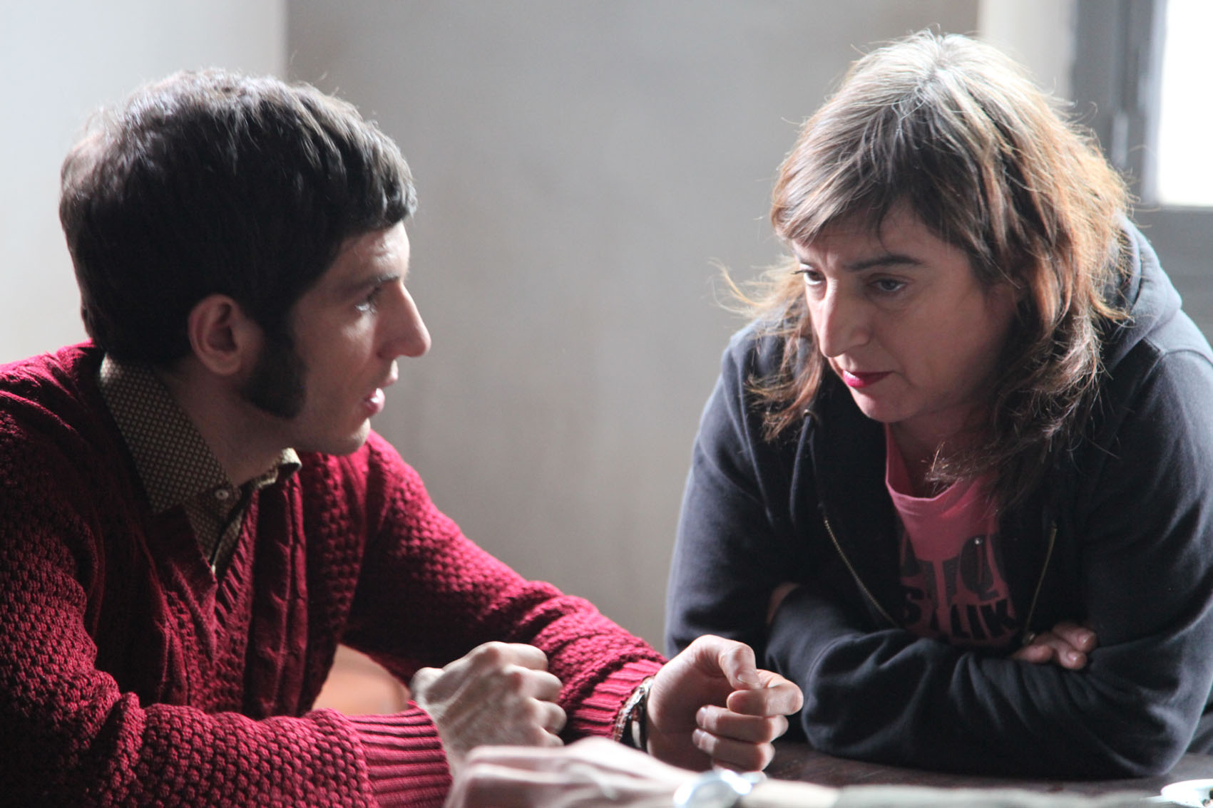 Momento del rodaje de "El precio de la libertad", dirigida por Ana Murugarren, que prepara una escena con Quim Gutiérrez